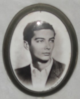 Angelo Ricapito